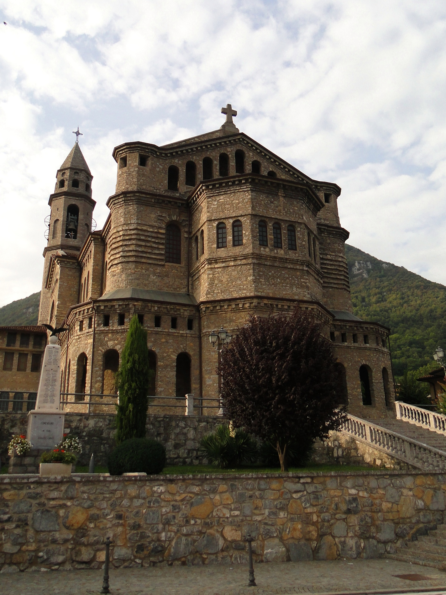 Comenduno, fraz. di Albino (BG), chiesa parrocchiale di Cristo Re